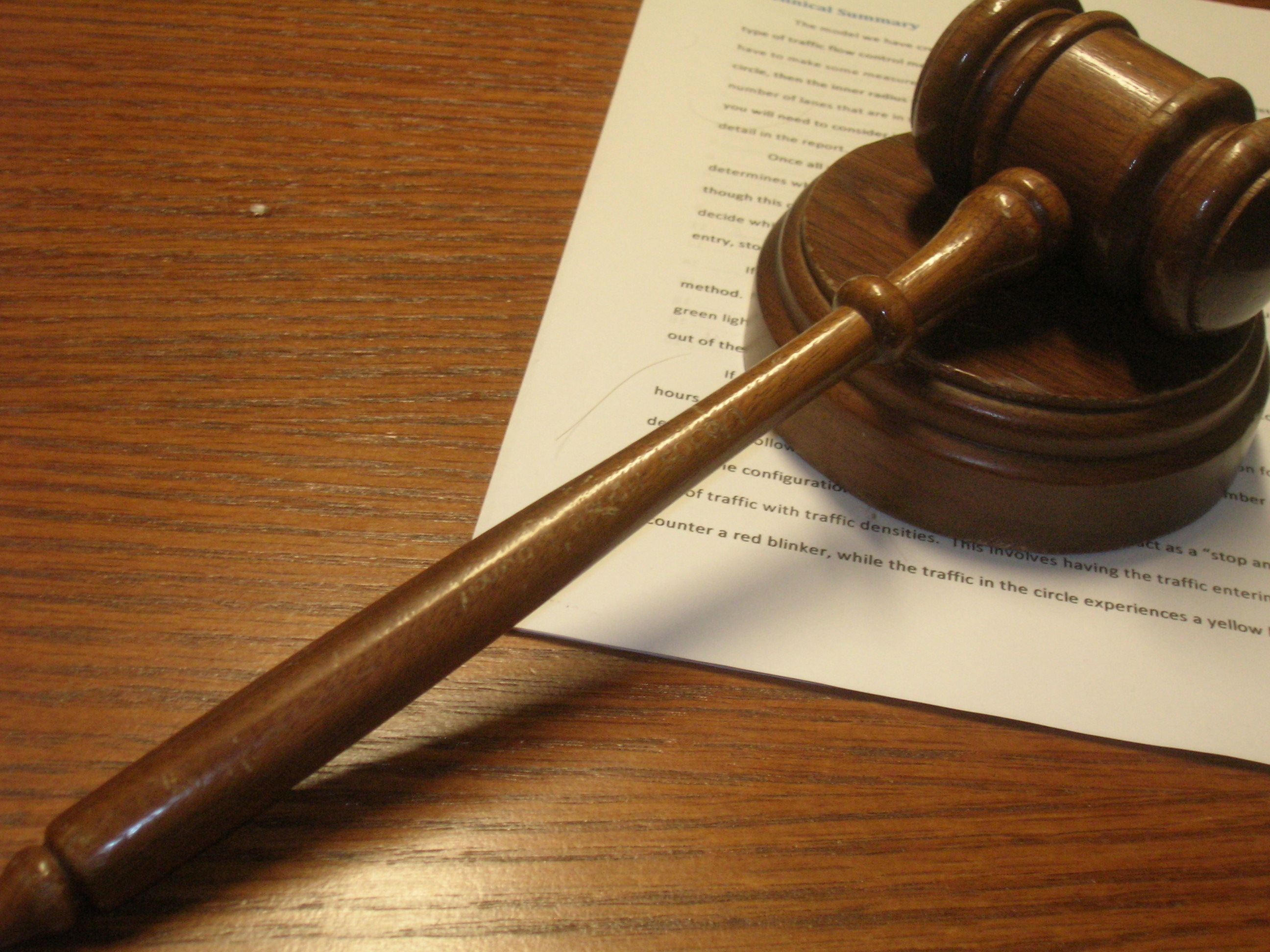 Gavel.